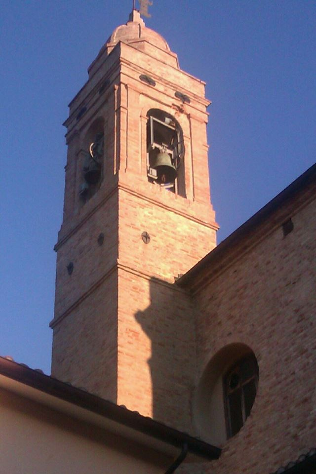 Campanile della chiesa di S.Lucia di Piagge